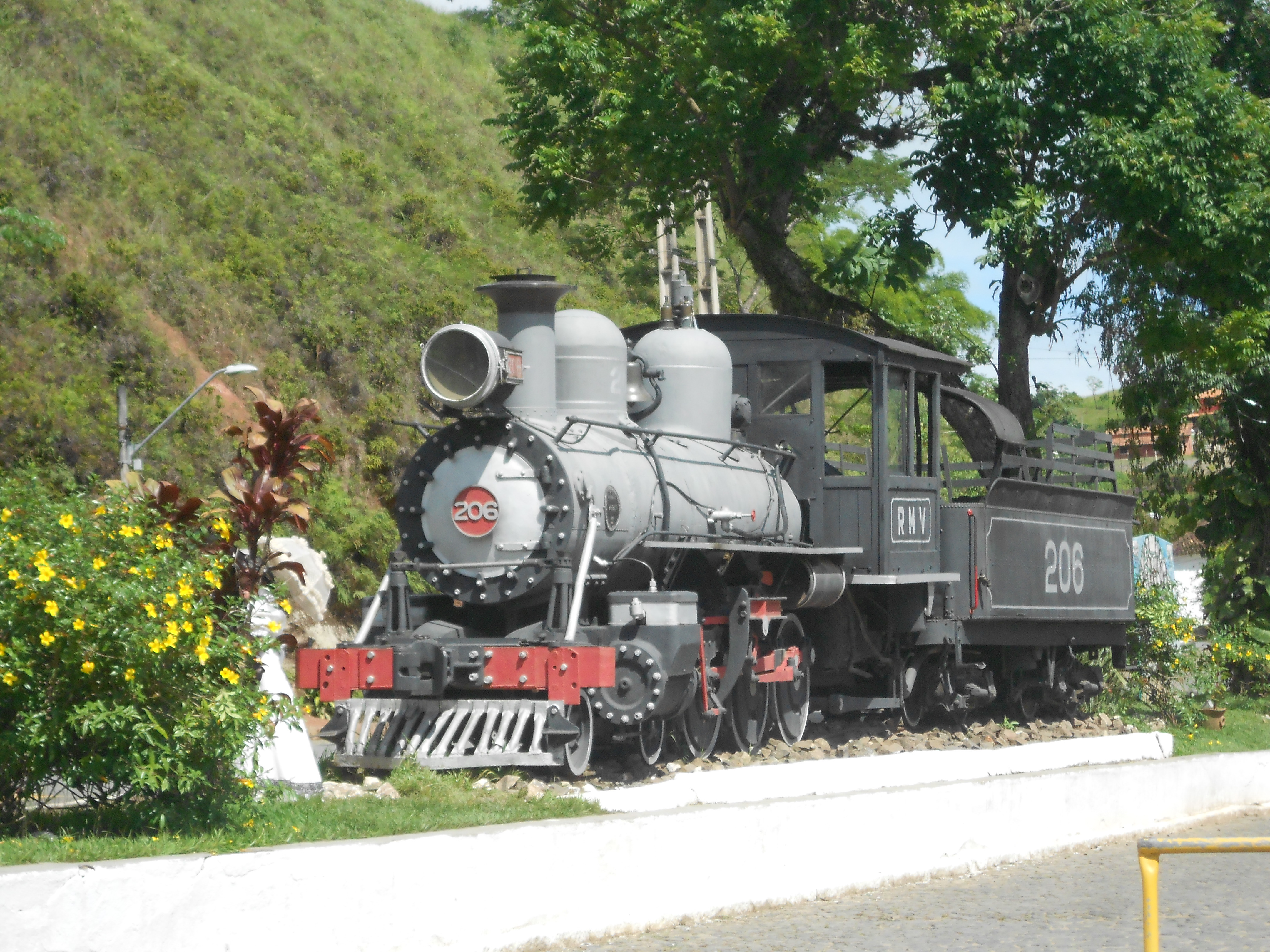 Trem de Conservatória, distrito de Valença, situado no estado do Rio de Janeiro, Brasil.